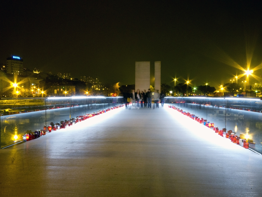 Most hrvatskih branitelja u Rijeci, sjećanje na vukovarsku tragediju